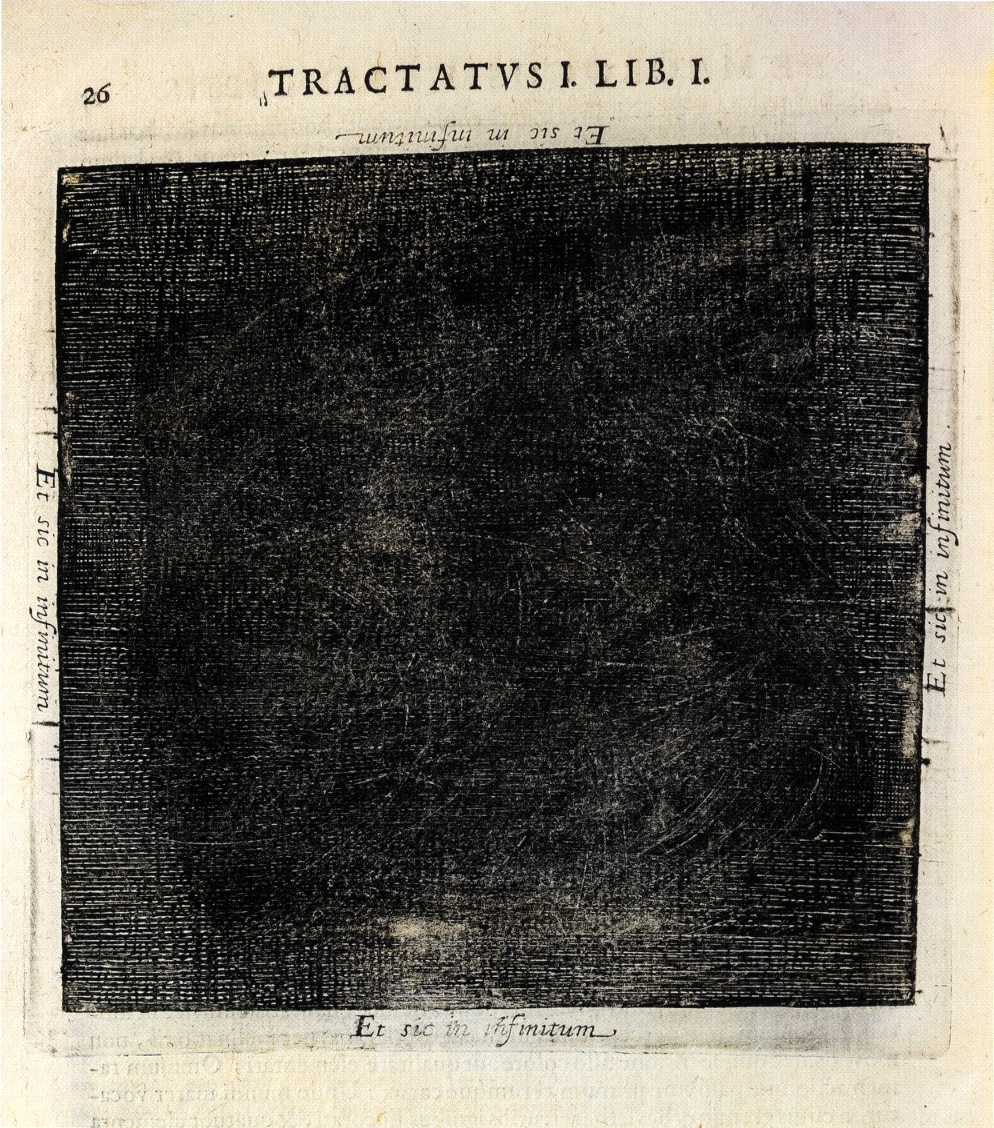 Robert Fludd 1617. Aus Exemplar: Staatsbibliothek zu Berlin, Rara, A 4917